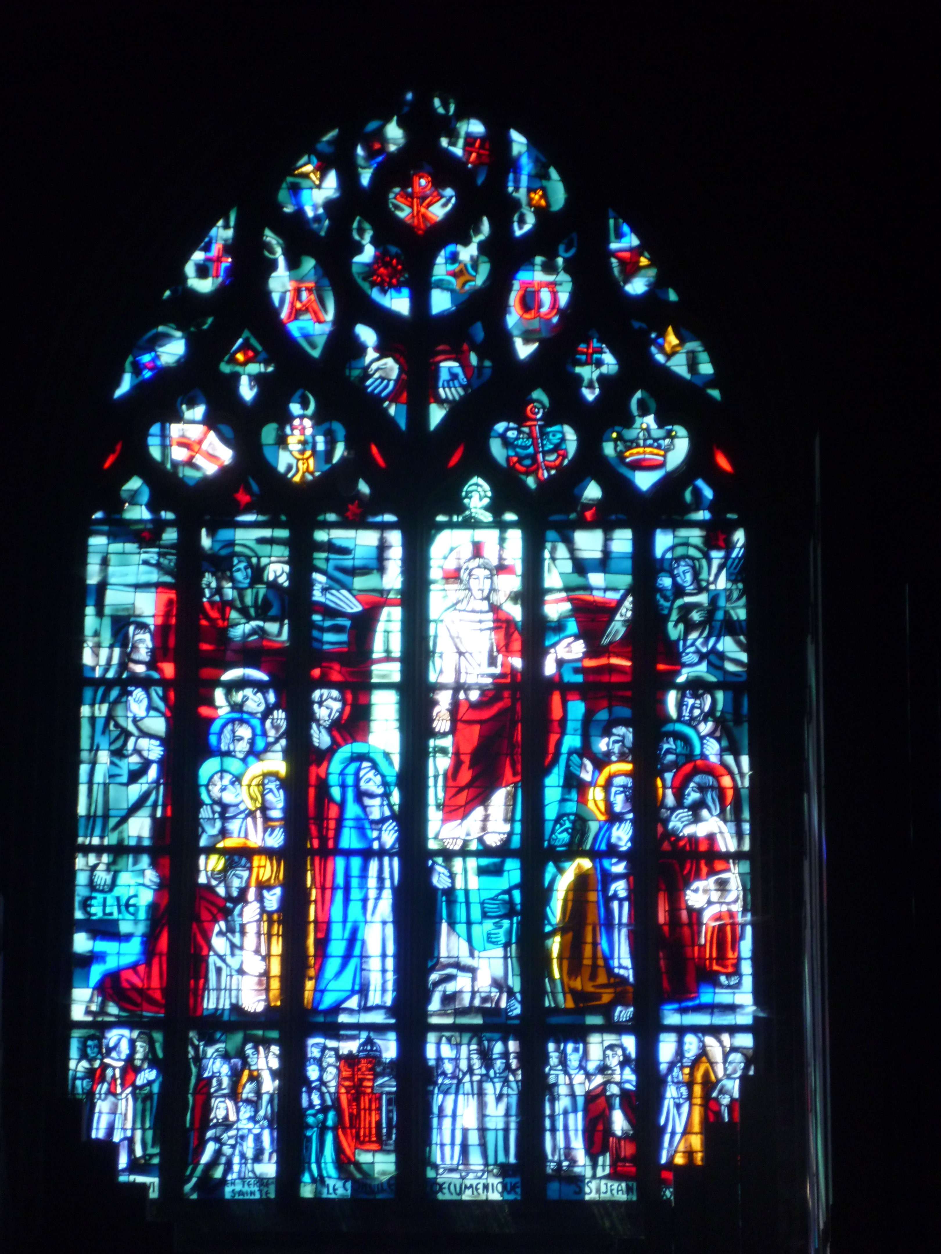 Vitrail - Basilique Saint Sauveur - Dinan - Côtes d'Armor